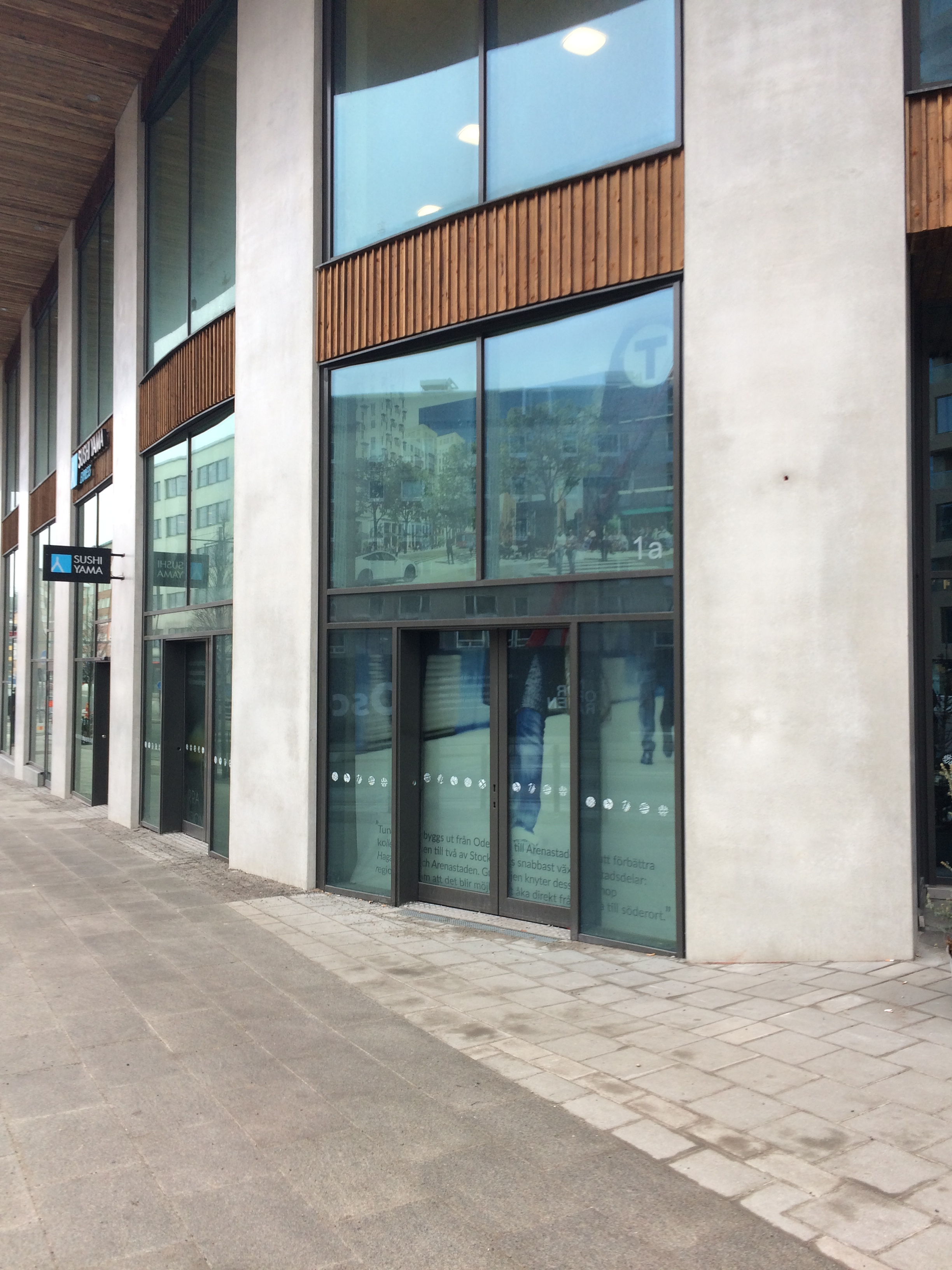 Planerad nedgång till Gula linjen vid Torsplan, Stockholm. Nedgången ligger i anslutning till Norra Stationsgatan 86.